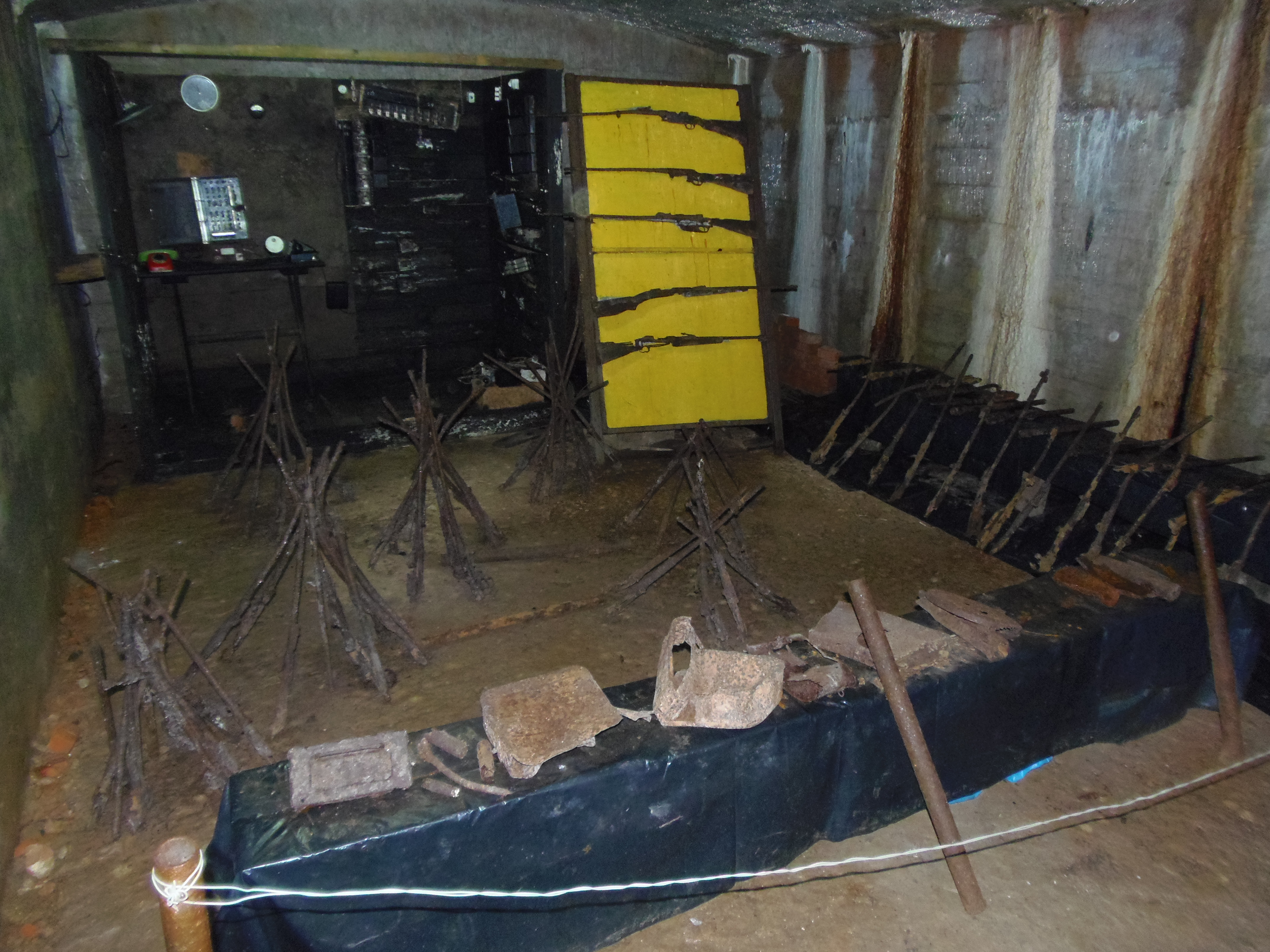 Arsenał broni w podziemnym mieście Hitlera w Osówce